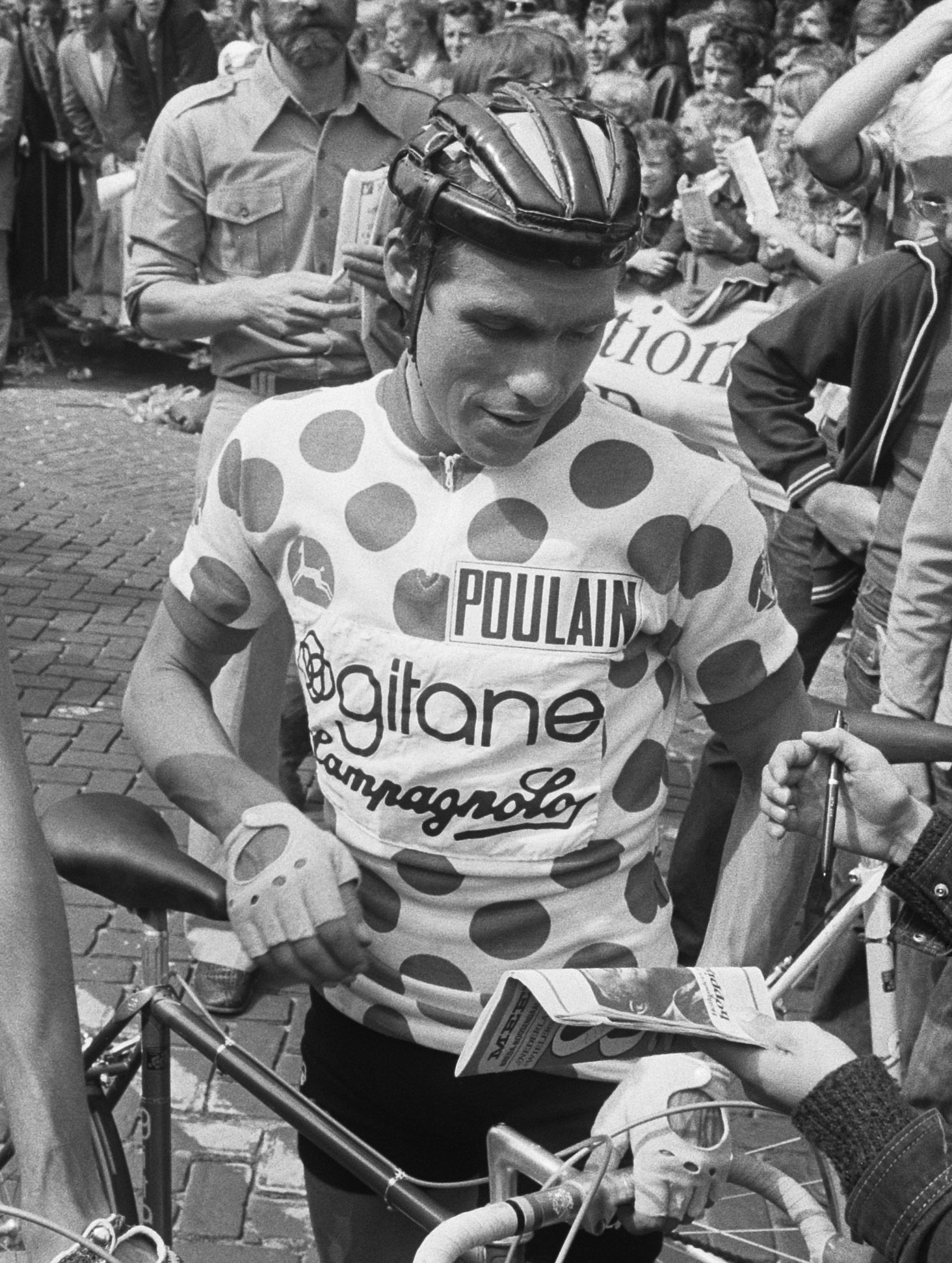 Lucien van Impe omringd door fans; de Acht van Chaam 1975